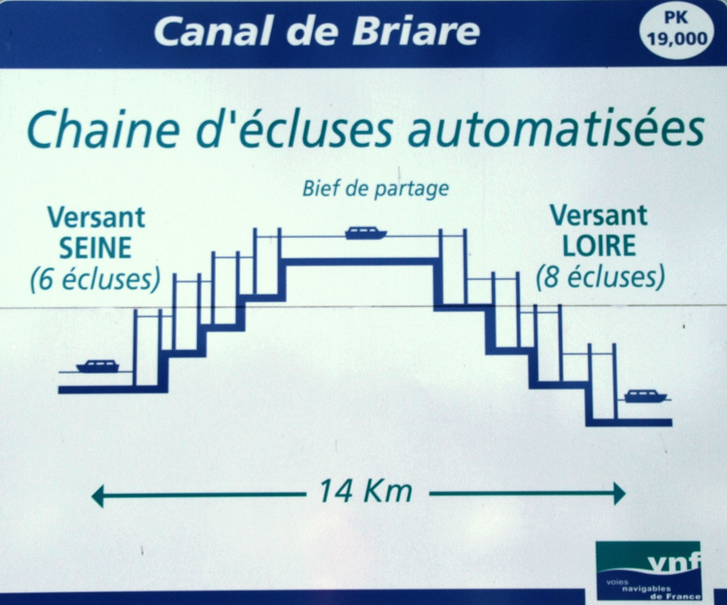 Canal de Briaire - Schéma de la chaîne d'écluses au bief de partage